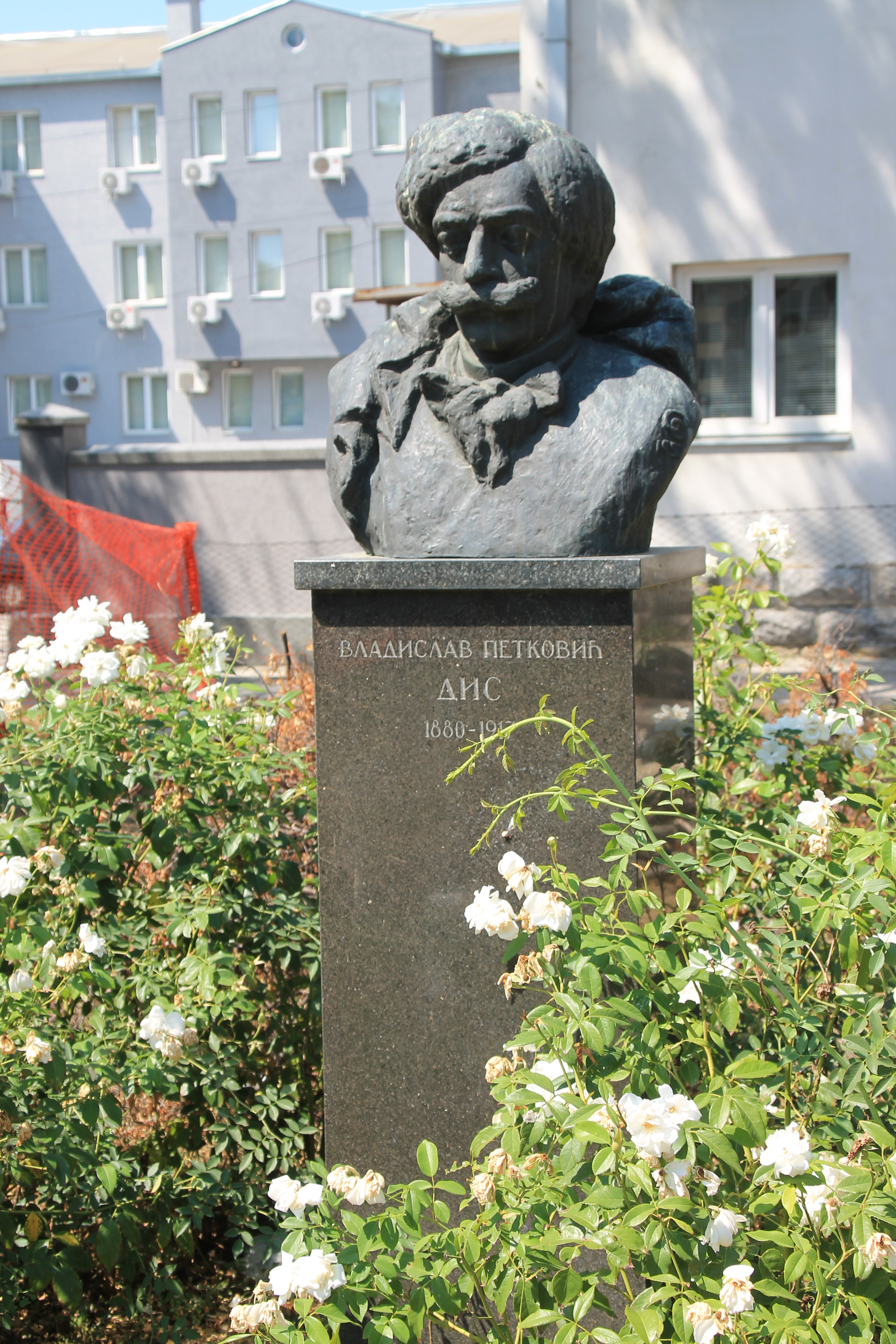 Gospodar Jovanov konak